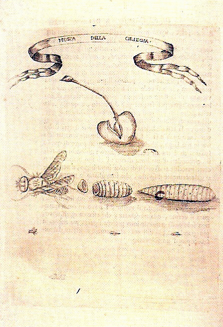 Illustration of Esperienze intorno alla Generazione degli Insetti by Francesco Redi (1687)